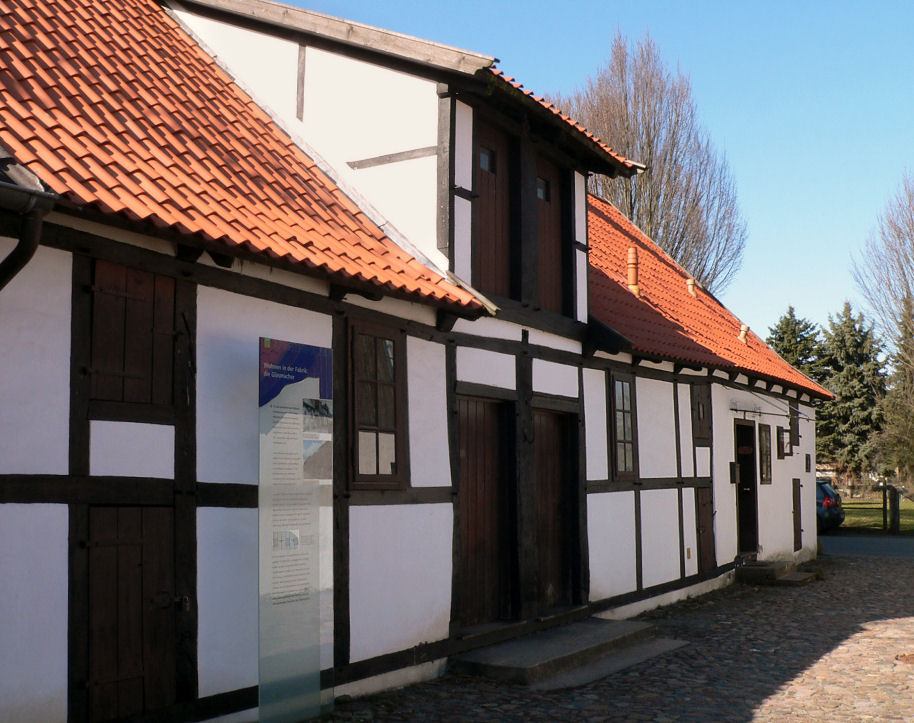 Arbeiterwohnhaus der Glashütte Gernheim